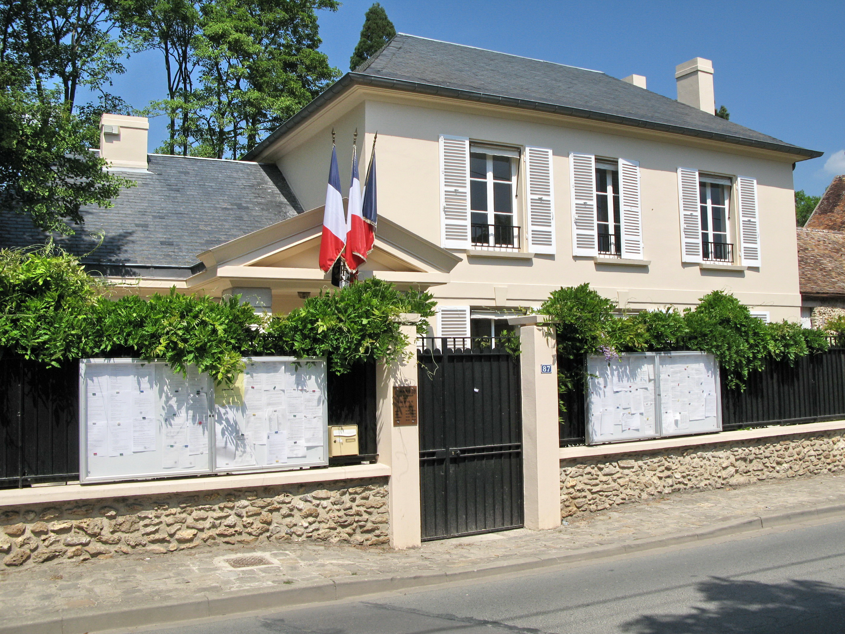 Mairie du Val-Saint-Germain (Essonne)